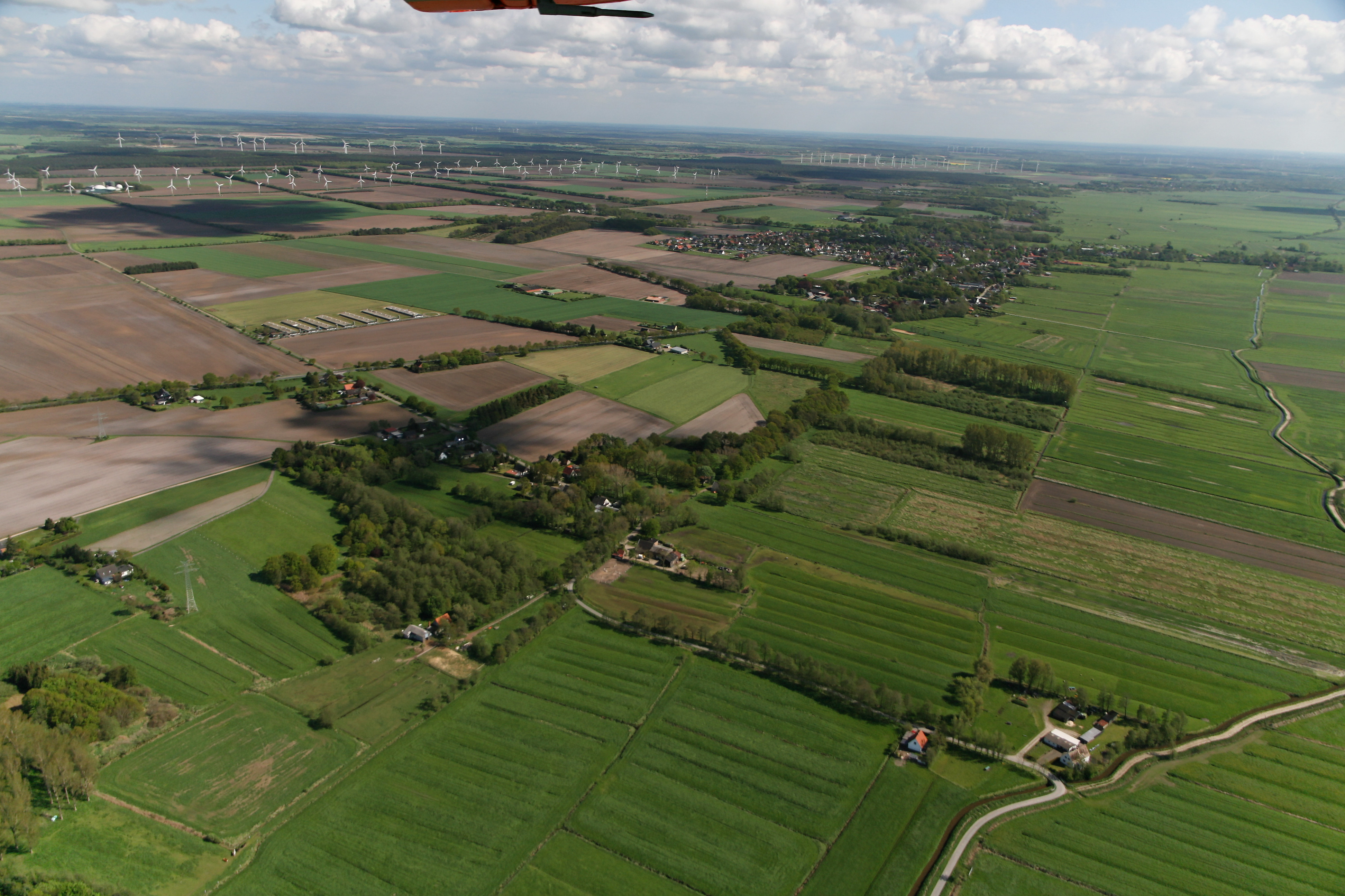 Luftaufnahme: Landschaft und Siedlung bei Hartingspecken bei Nordholz; im Hintergrund der Ort Midlum; etwas links der Bildmitte die Farm Midlum (Hybridhühner, Geflügelzuchtanlage der Aviagen-EPI, EW Group) in Nordholz.